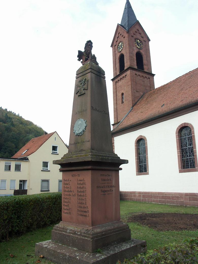 War Memorial - Krieger-/Kriegsopferdenkmal - Mémorial de guerre